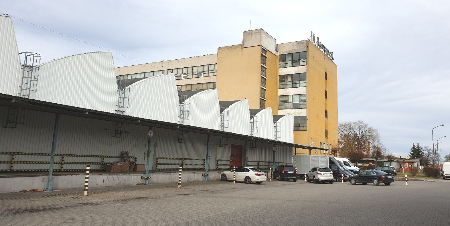 Stargard. Były Luxpol z budynkami produkcyjnymi